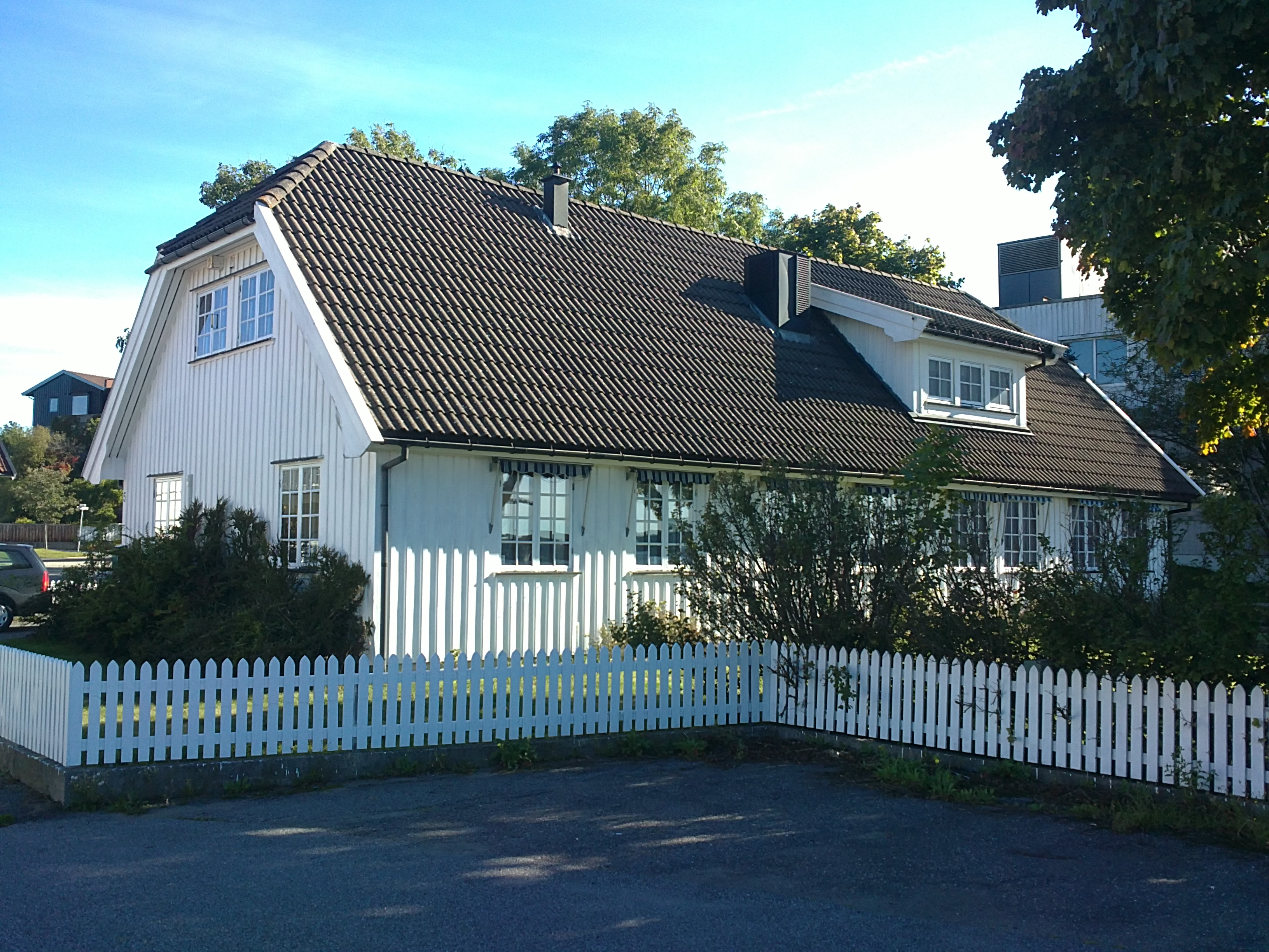 Bilde av Larvik Havnekontor, Karistranda.